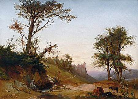 Paysage bucolique Hippolyte Leymarie (XIXe siècle)